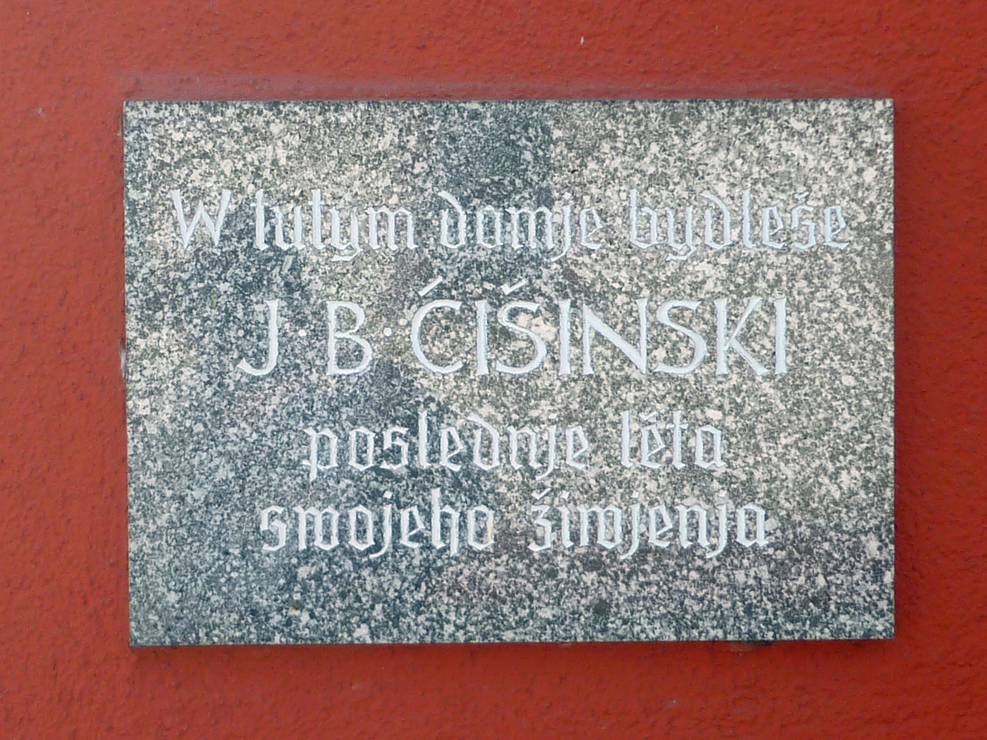 Tafel am Wohnhaus von Jakub Bart-Ćišinski (1856–1909), sorbischer Dichter, in Panschwitz-Kuckau, Cisinski-Str. Hornjoserbsce: Wopomnjenska taflička při bydlenskim domje Jakuba Barta-Ćišinskeho w Pančicach.